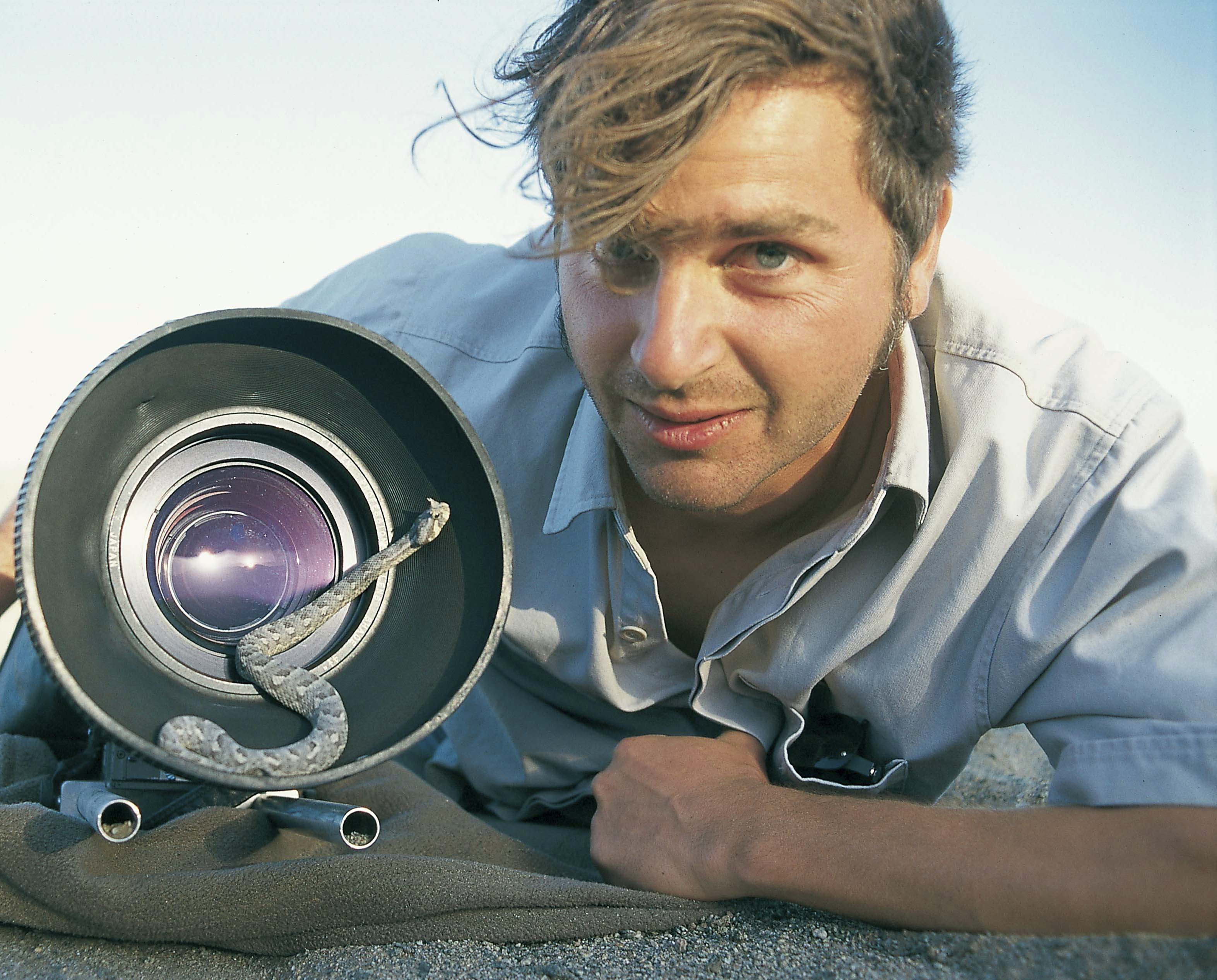 Oliver Goetzl - Namibia with many horned adder / Oliver Goetzl in Namibia mit einer Büschelbrauenotter